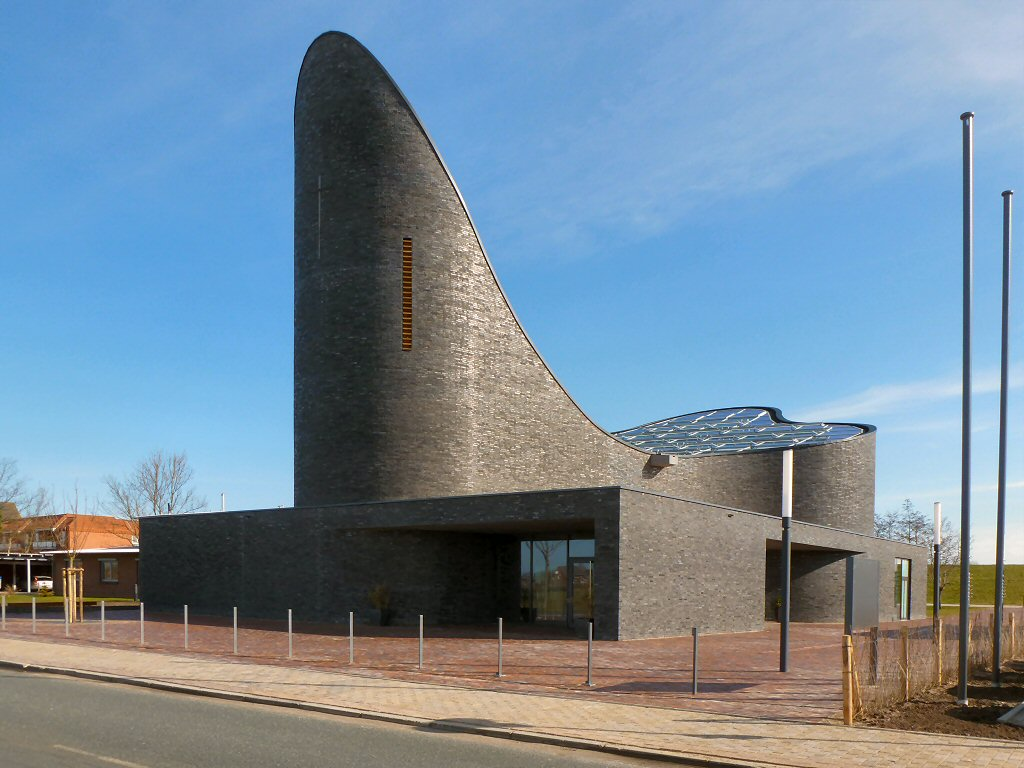 Außenansicht der katholische Kirche St. Marien in Schillig, Gemeinde Wangerland, Niedersachsen